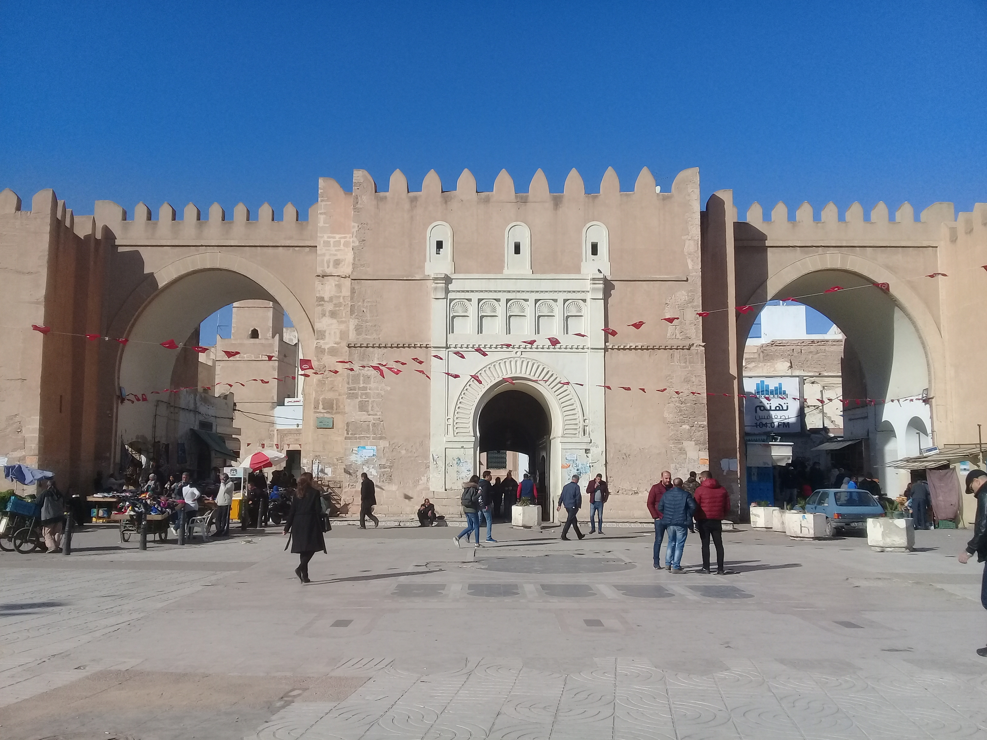 Bab Diwan - Porte Delcassé, vue d'ensemble avec les ouvertures des années 1970